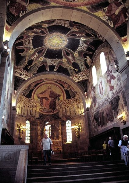 Viborg Domkirke, Koret Joakim Skovgaard